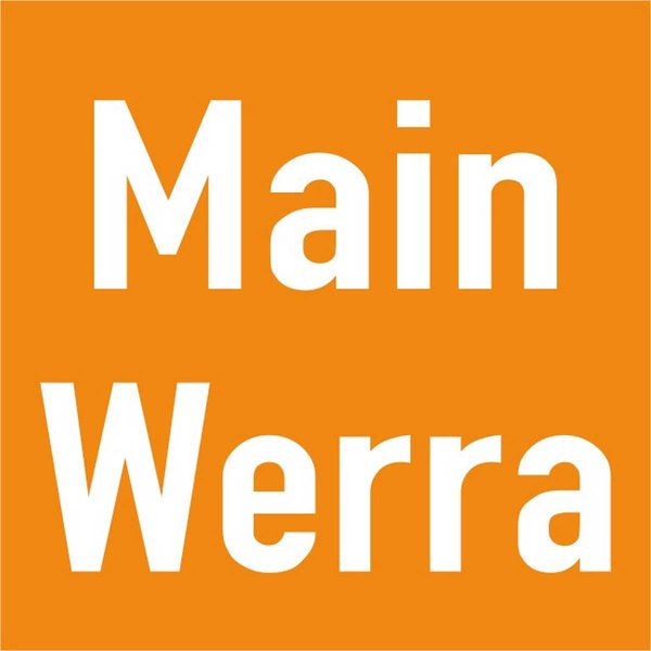 Piktogramm des Radwanderweges Main-Werra.